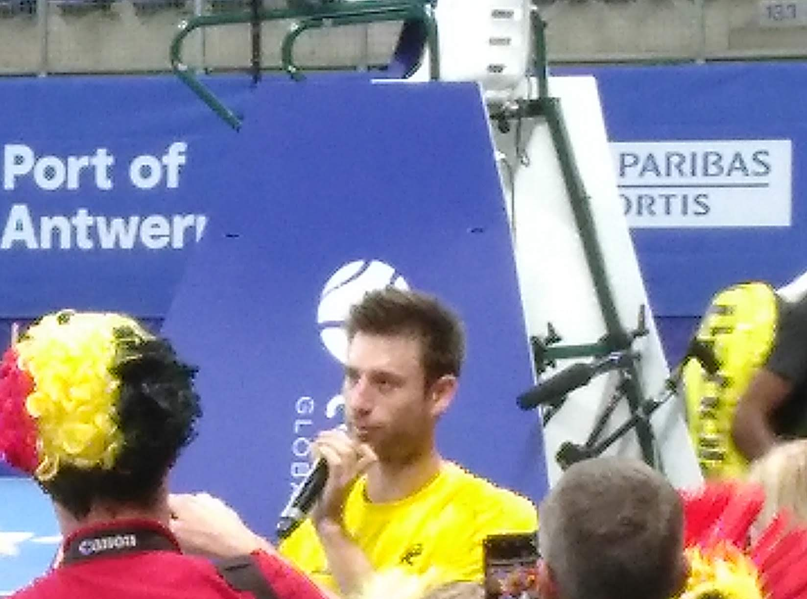 Sander Gillé in de Lotto Arena na de verloren halve finale dubbel in 2019.